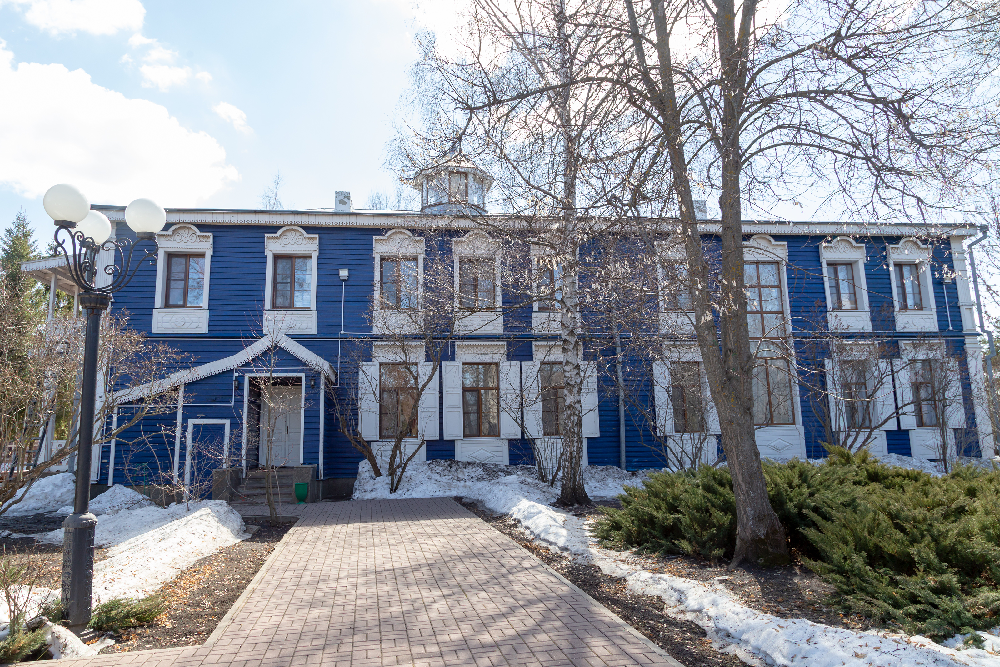 Усадьба Ивановка, в которой в 1890-1917 гг. весной и летом жил и работал композитор С.В. Рахманинов: Ивановка, Уваровский район, Тамбовская область